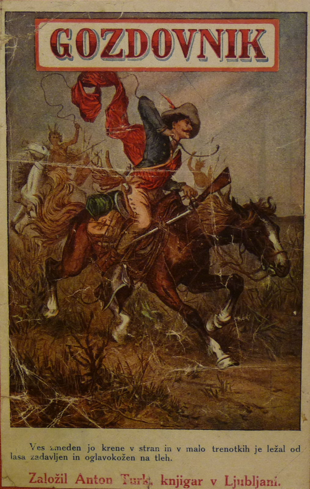 Karl May: Gozdovnik (Ljubljana: Anton Turk, 1898)